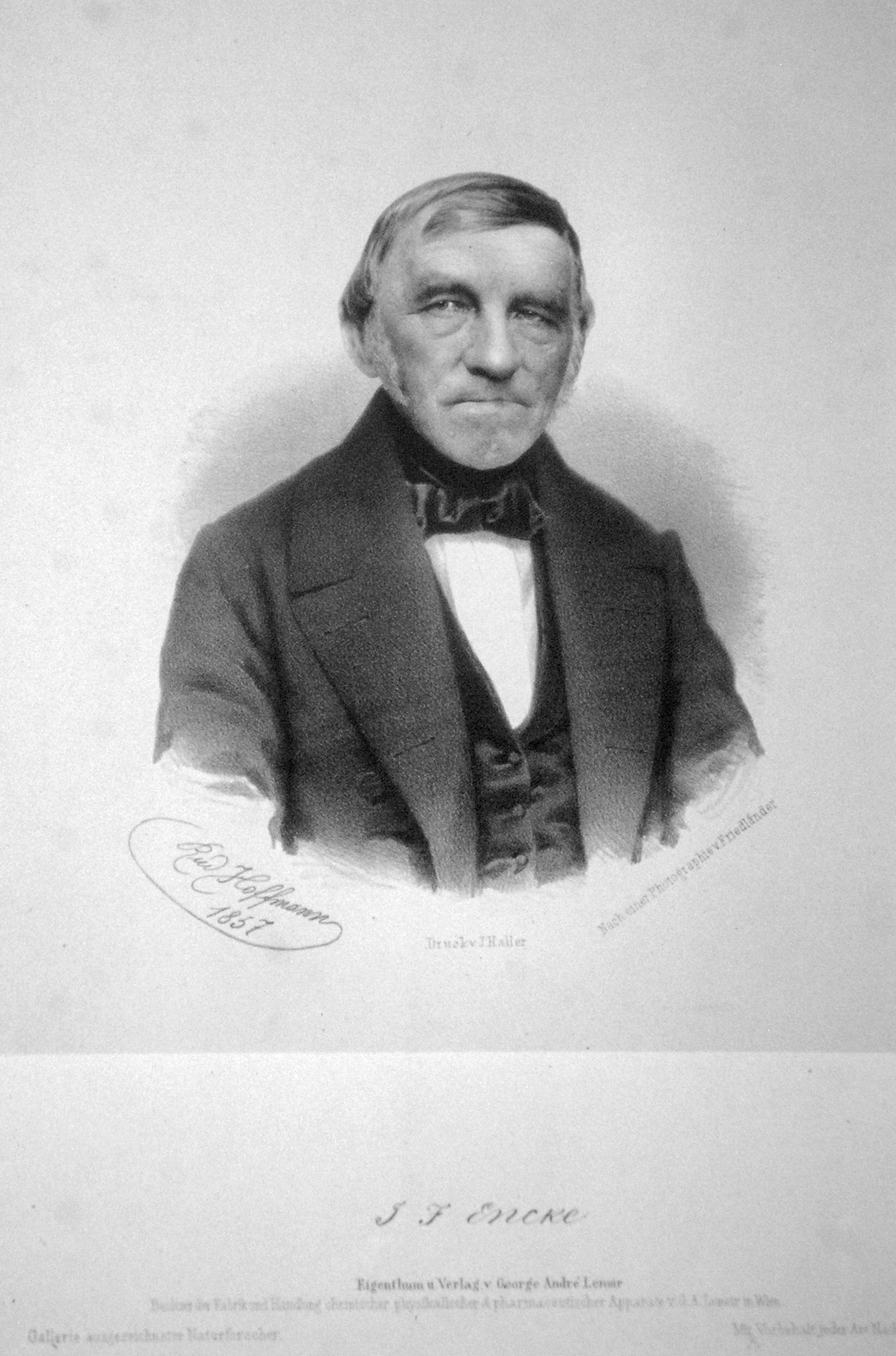 Johann Fran z Encke (1791-1865), deutscher Astronom. Lithographie von Rudolf Hoffmann, 1857. Nach einer Photographie von Ferdinand Küss.